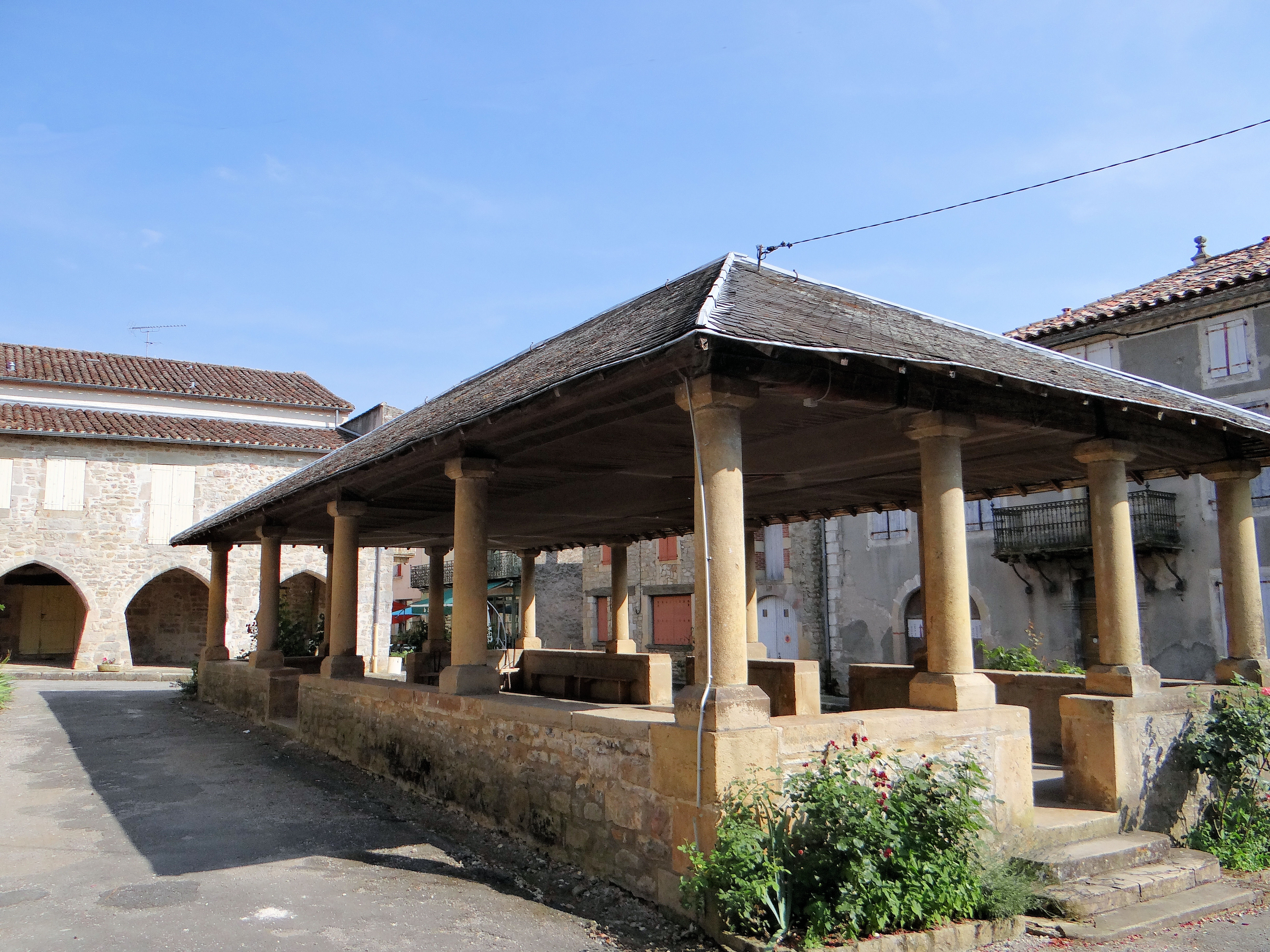 Verfeil - Halle